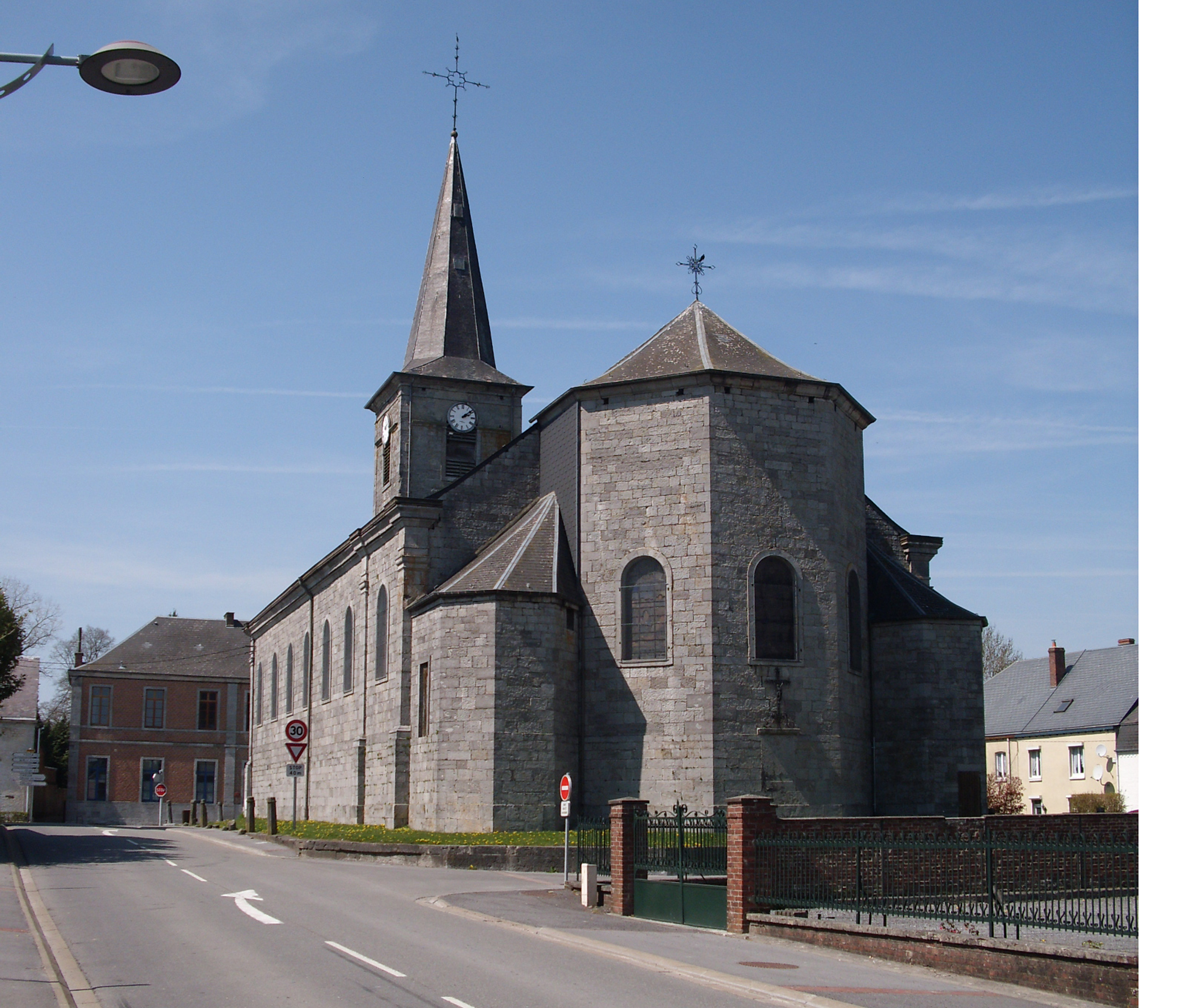 L'Eglise de Ohain - Commune de Ohain - Canton de Trélon - Arrondissement d'Avesnes-sur-Helpe - Département du Nord - Région du Nord-Pas-de-Calais - France